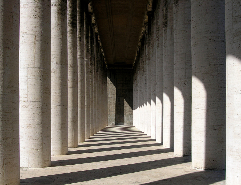 Museo della civiltà romana, E.U.R., Roma